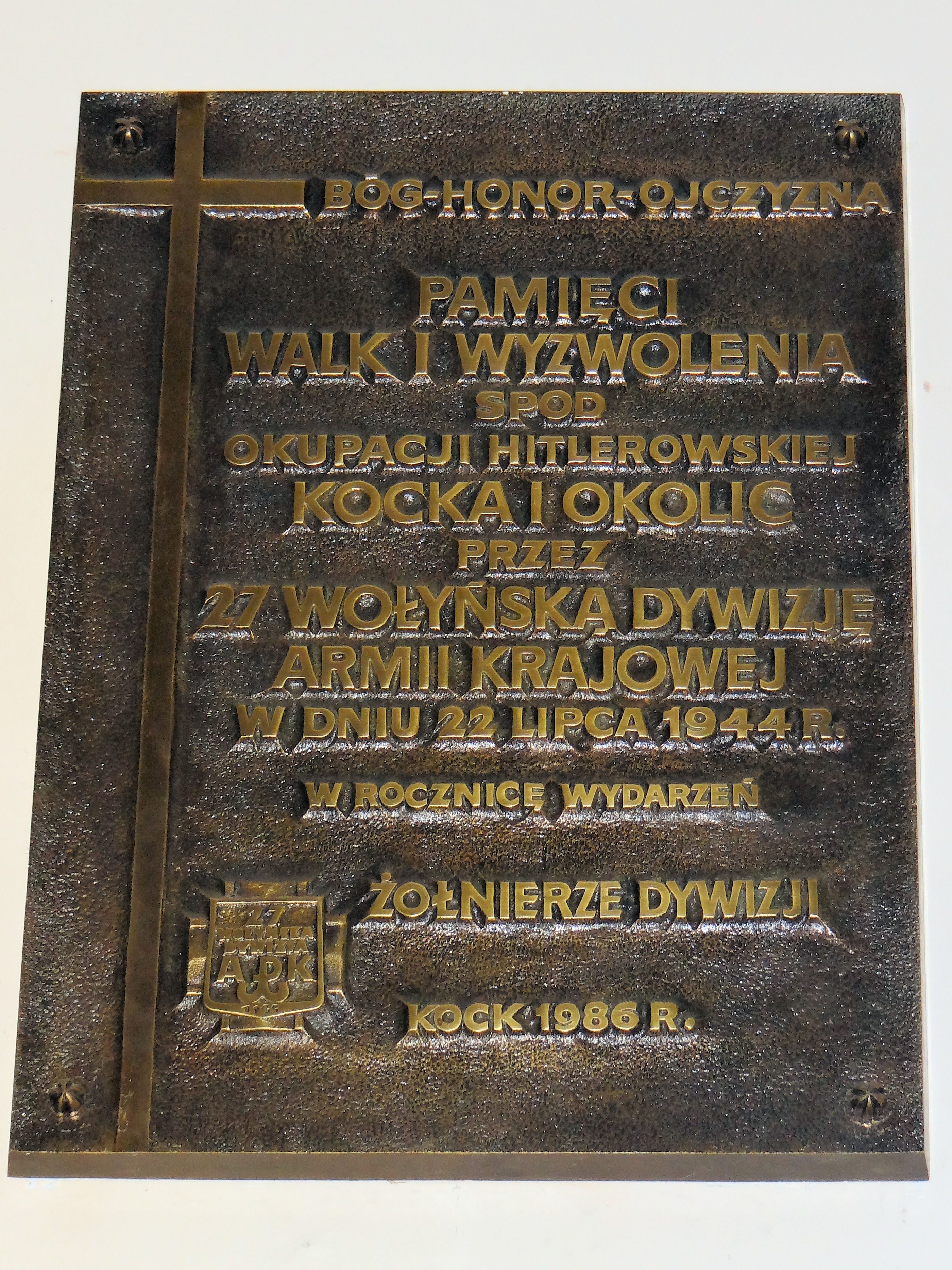 Kościół Wniebowzięcia NMP w Kocku - tablica w kruchcie poświęcona pamięci wal i wyzwolenia spod okupacji hitlerowskiej Kocka i okolic przez 27 wołyńską Dywizję Armii Krajowej w dniu 22 lipca 1944 r - w rocznicę wydarzeń - żołnierze dywizji - Kock 1986 r.